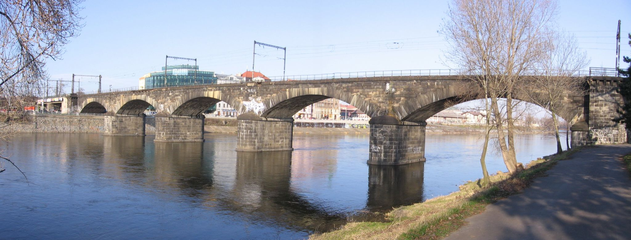 Negrelliho viadukt nad levým ramenem Vltavy